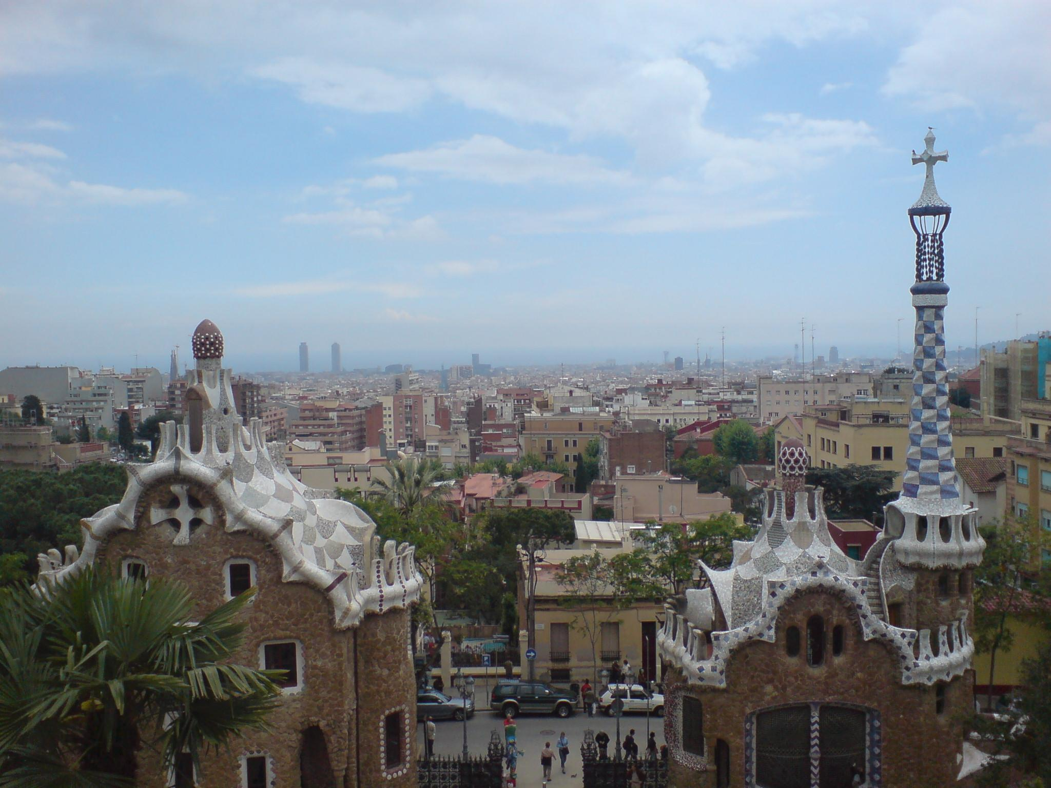 Барселона